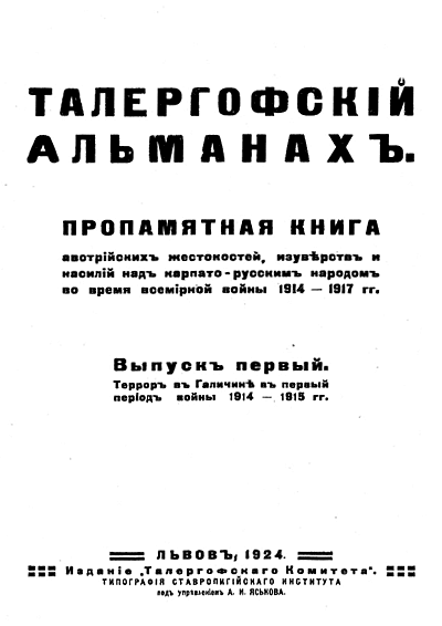 Талергофский Альманах. Издание Талергофского комитета. Львов, 1924.